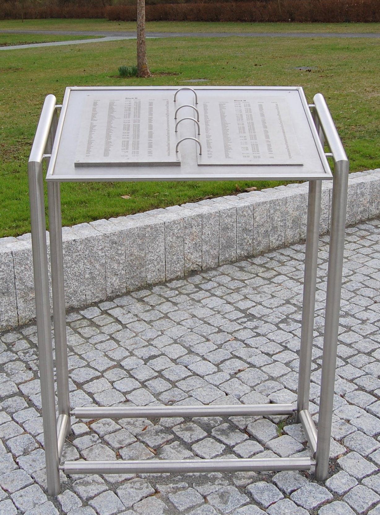 Namensbuch auf dem Feld der Vereinten Nationen in Westerhüsen